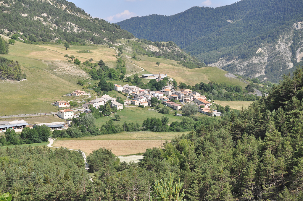 Lambruisse, le village